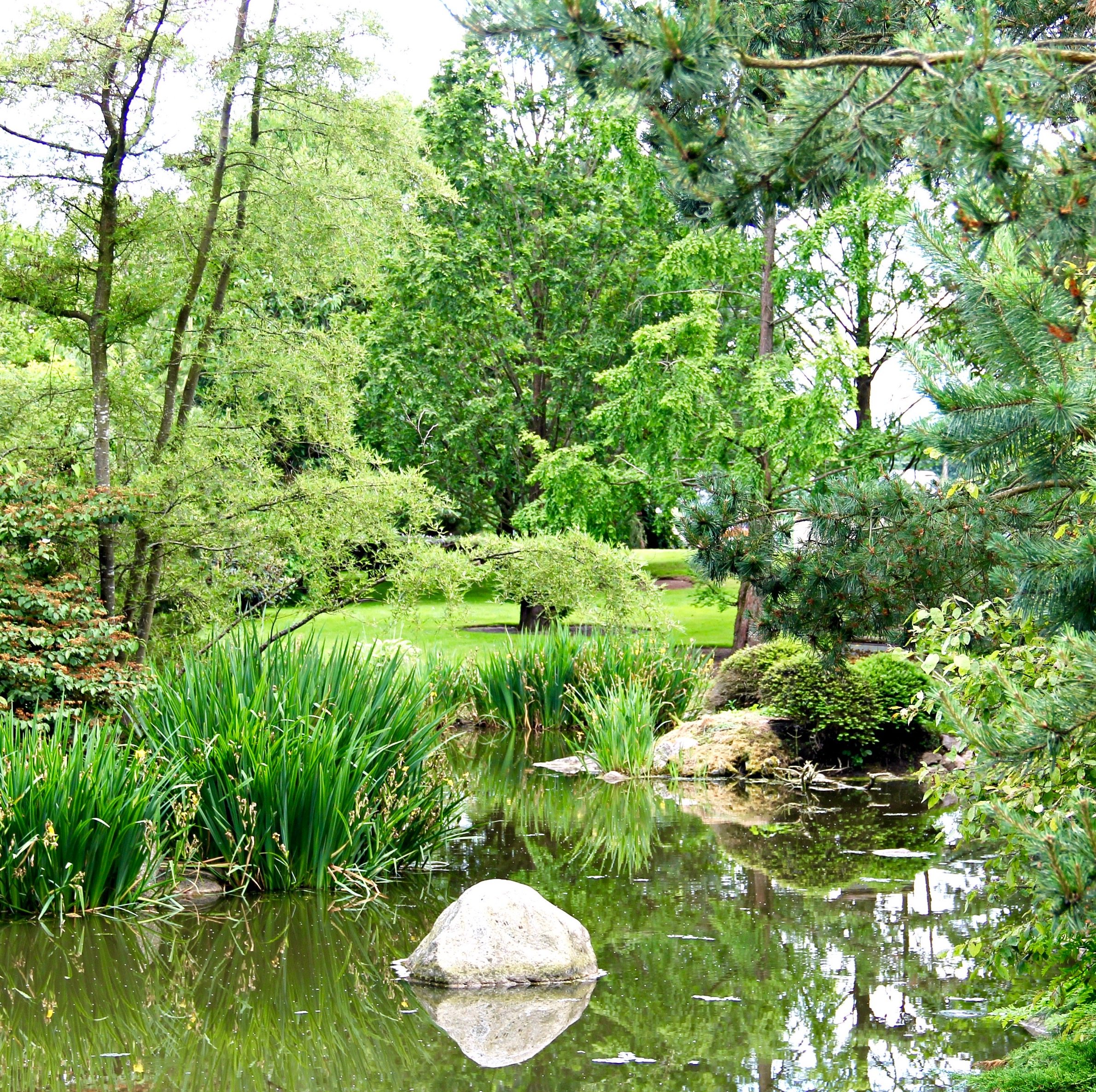 Lille udsnit af Birkegårdens Haver i Kalundborg Kommune.